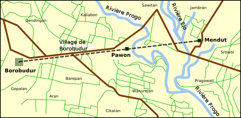 Localisation des villages de Borobudur, Mendut